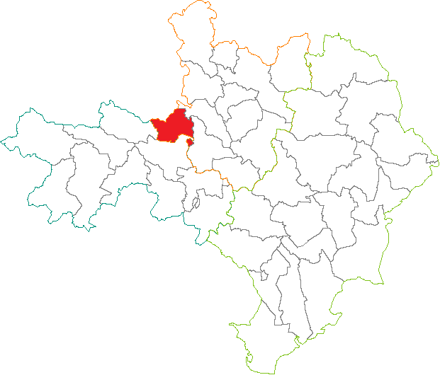 Situation du canton dans le département du Gard (France)